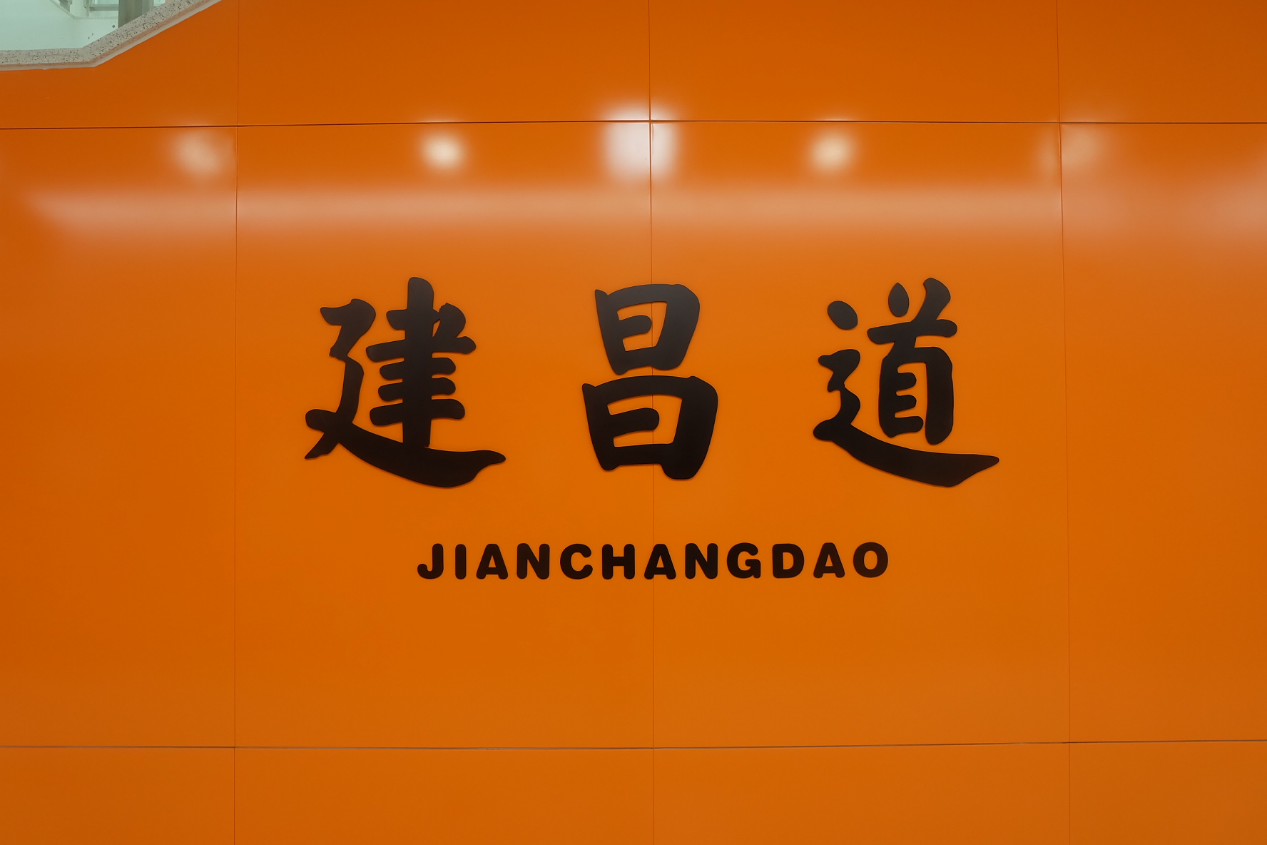 建昌道站站名大字壁，位于建昌道站站台层